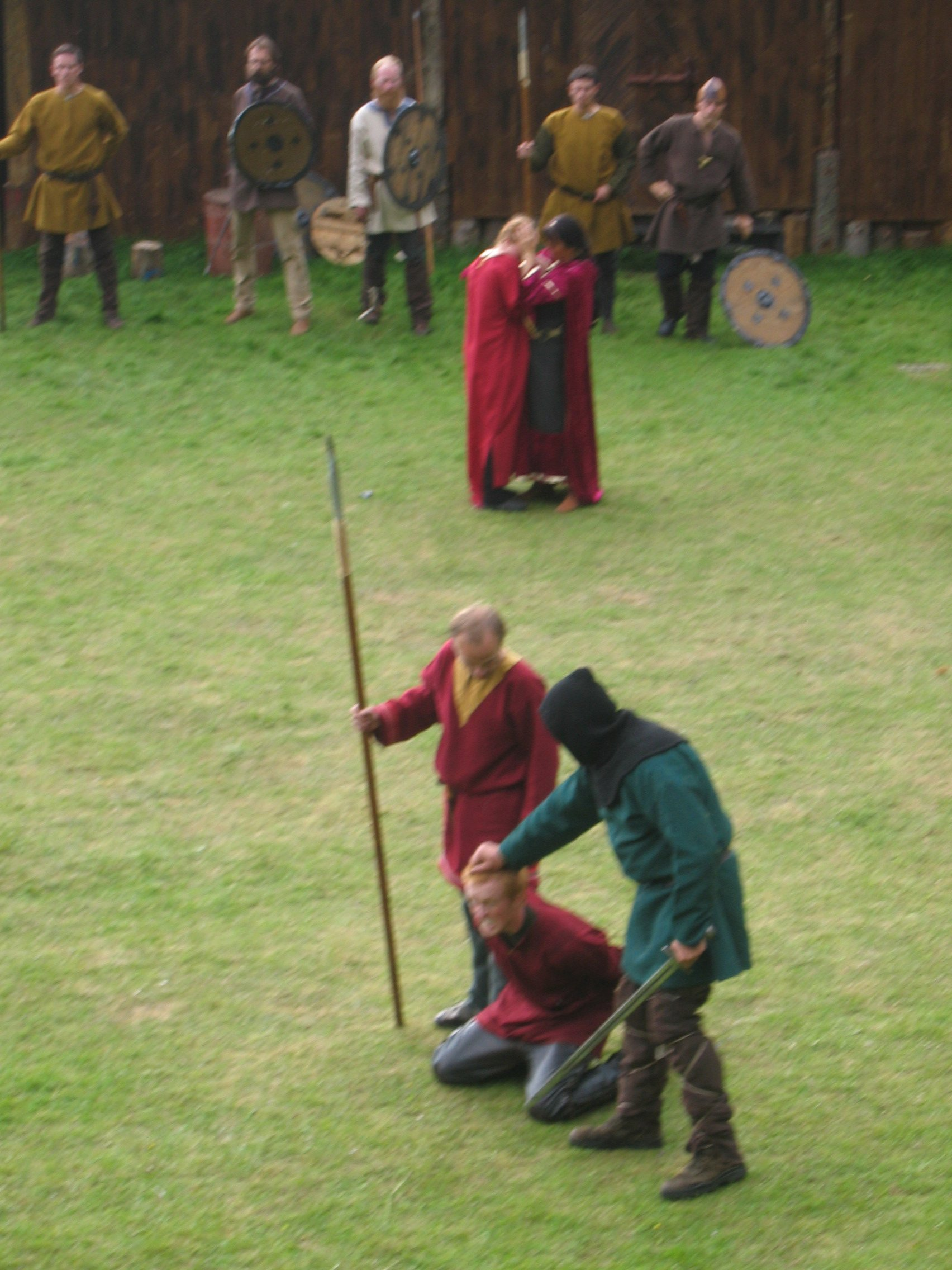 Steigen Sagaspill 2005 To vakter holder Hagbrat, som er bundet med Signes hår. Signe skriker på Dronning Ålov's skulder bak.